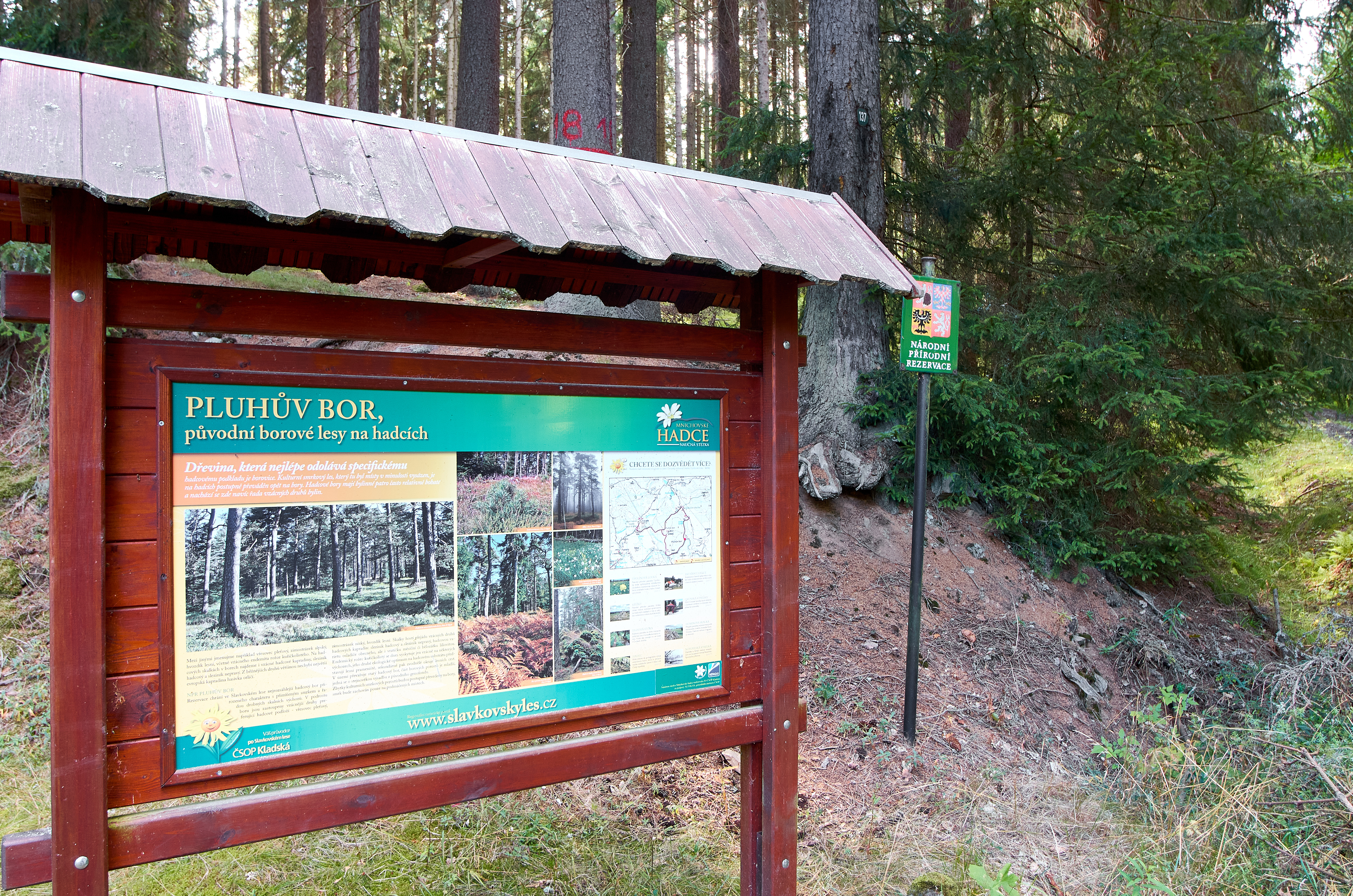 Národní přírodní rezervace Pluhův bor v CHKO Slavkovský les